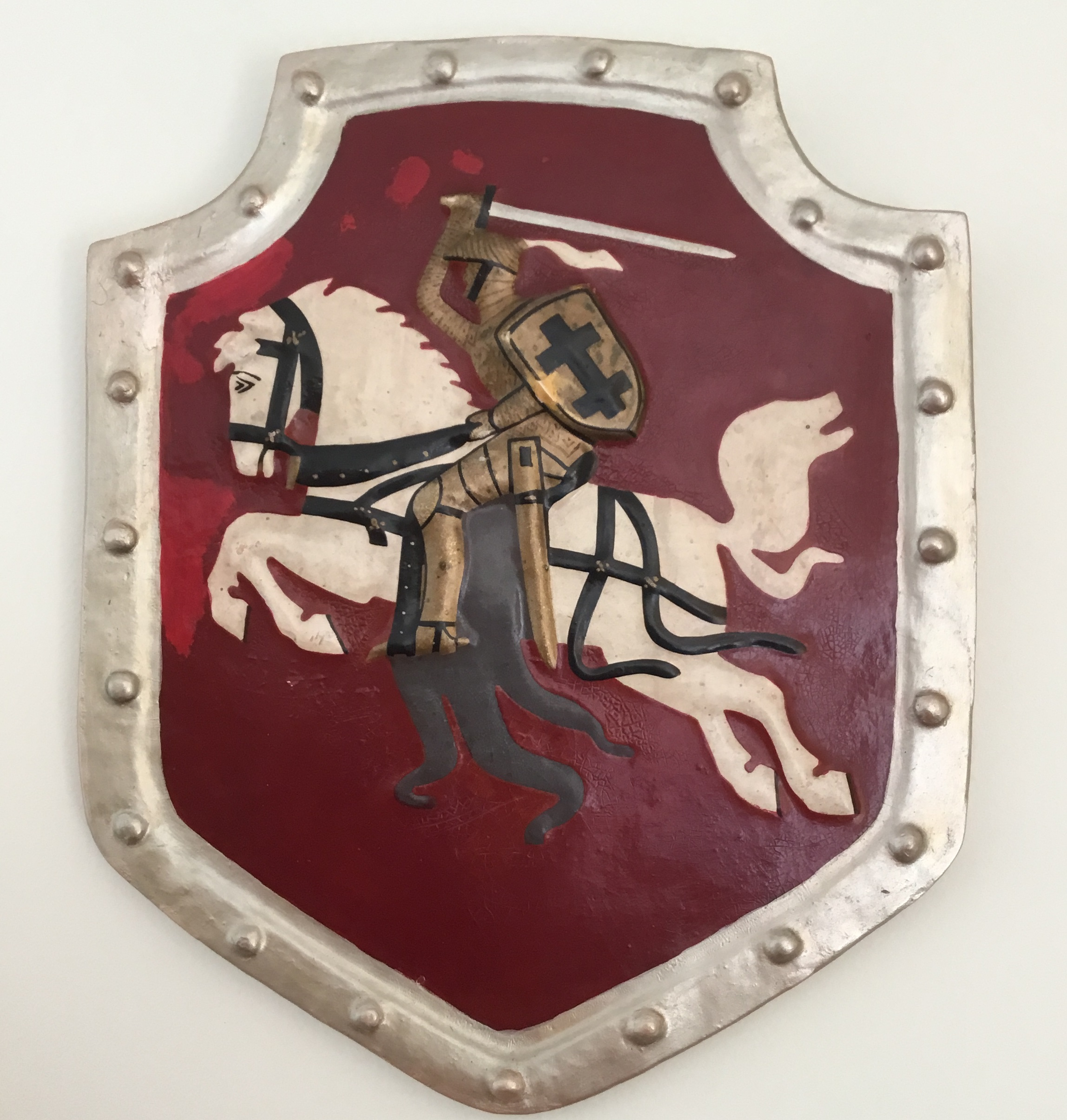 V. Rakštelio šeimos nuo pokario laikų saugomas Vytis.